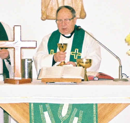 Liturgia Eucharystyczna podczas nabożeństwa Luterańskiej Wspólnoty Świętego Pawła Apostoła, celebruje ks. Jan Gross